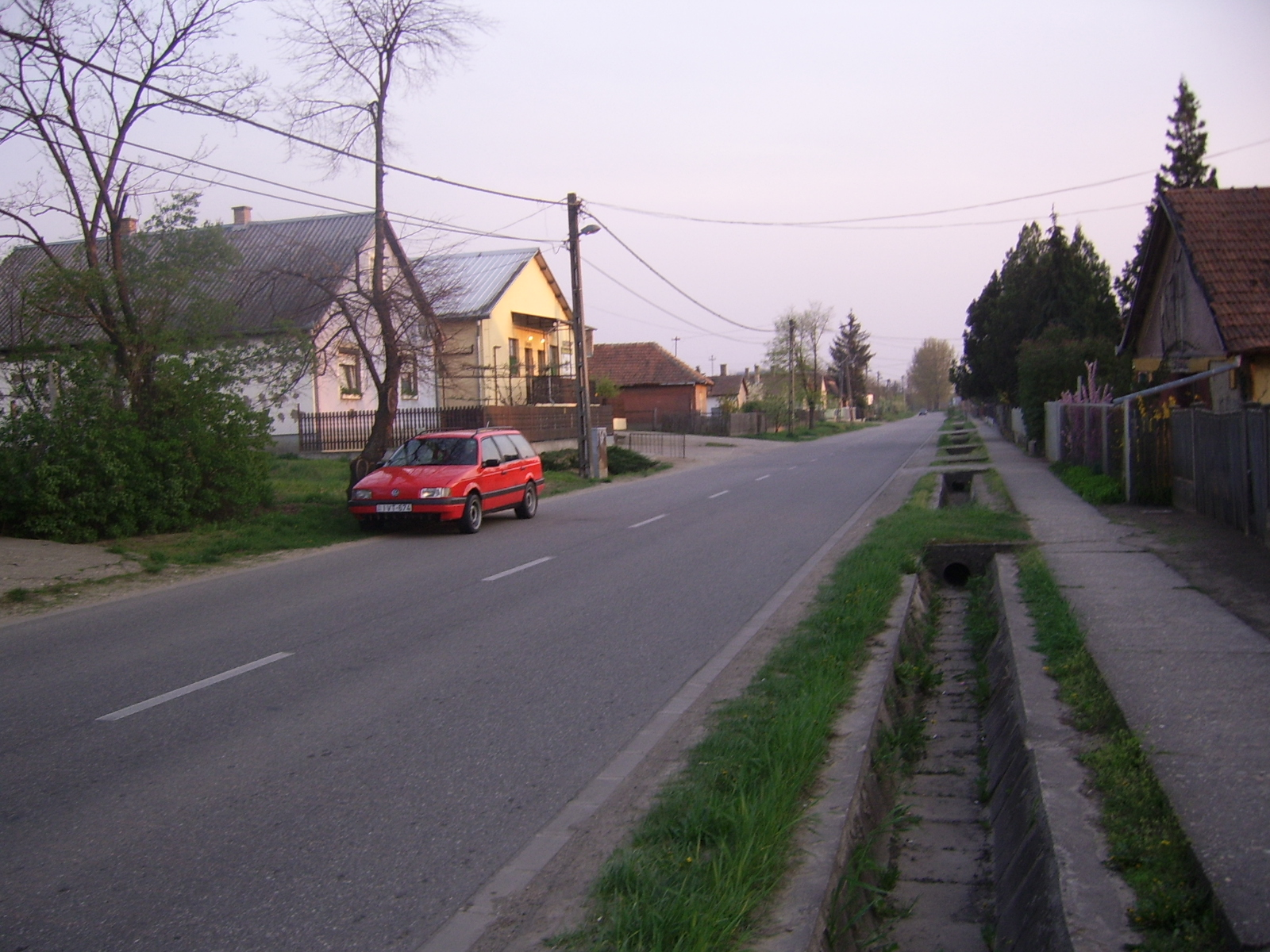 A 4102-es közút Balkányban